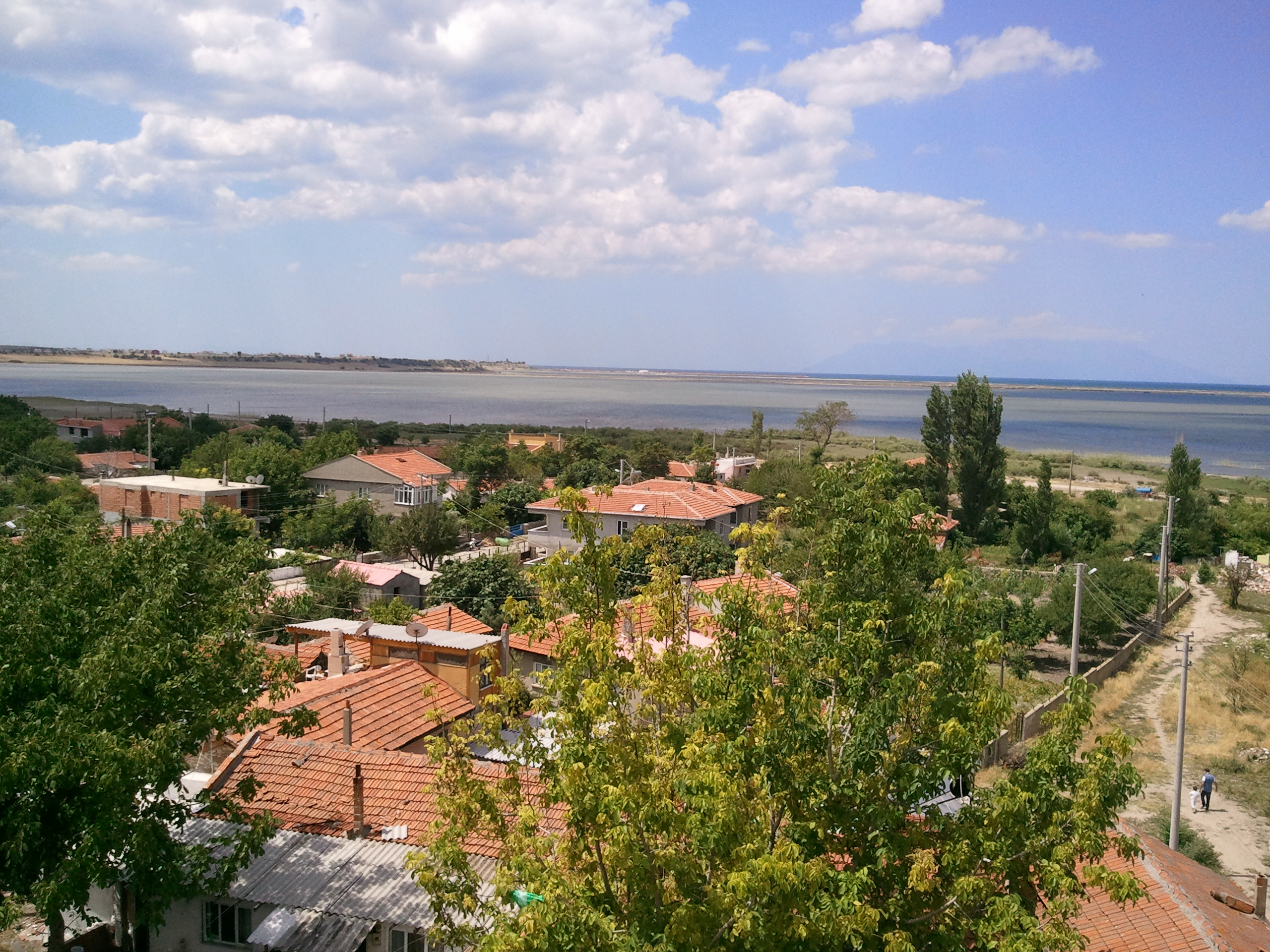 Enez Kalesinden Saroz - Ainos Castle to aspect of Saros